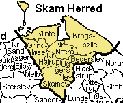 Skam Herred Odense Amt, Denmark. Map by Svend-Erik Christiansen, edited by user:Nico-dk .